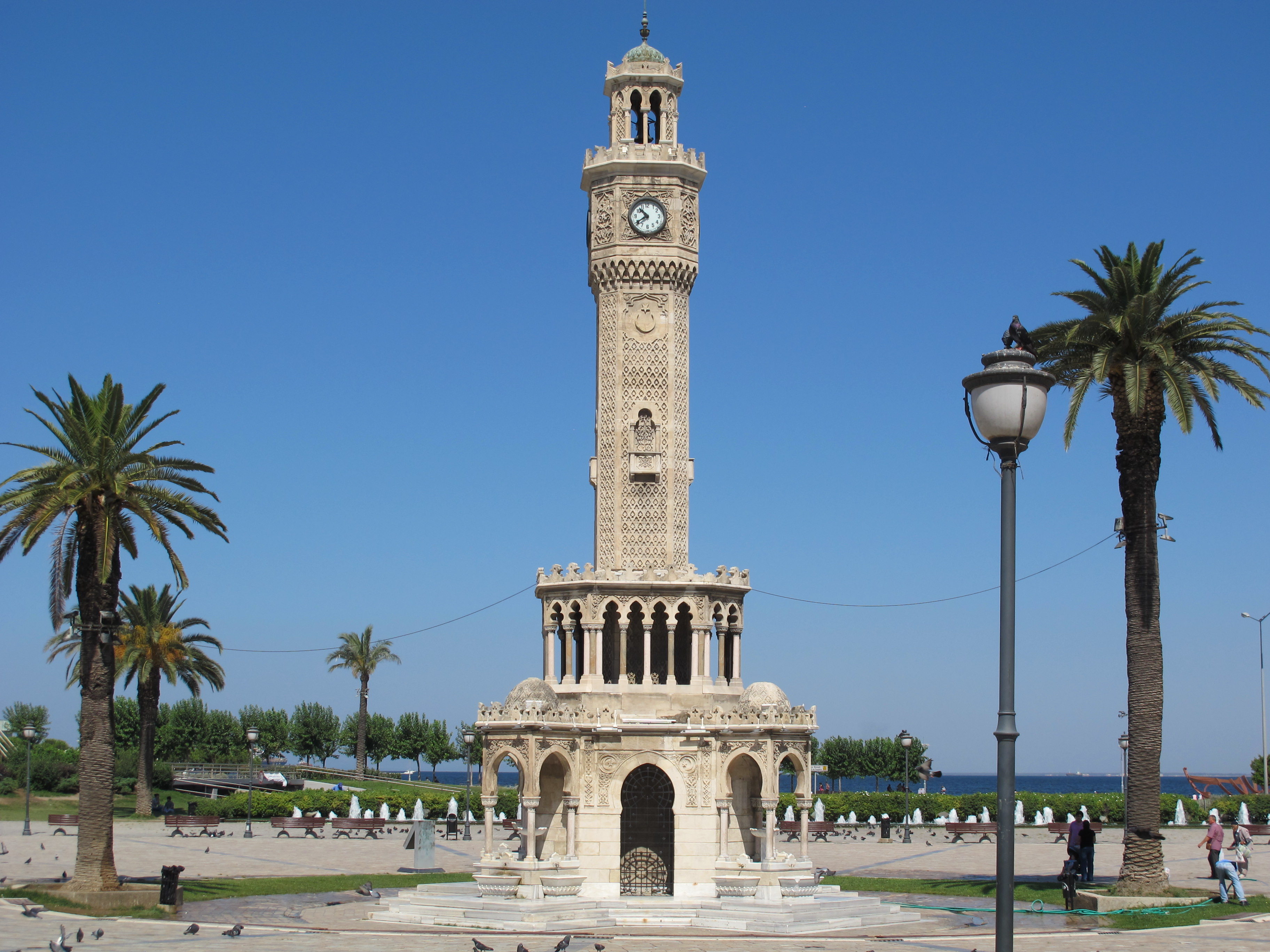 Izmir, torre dell'orologio